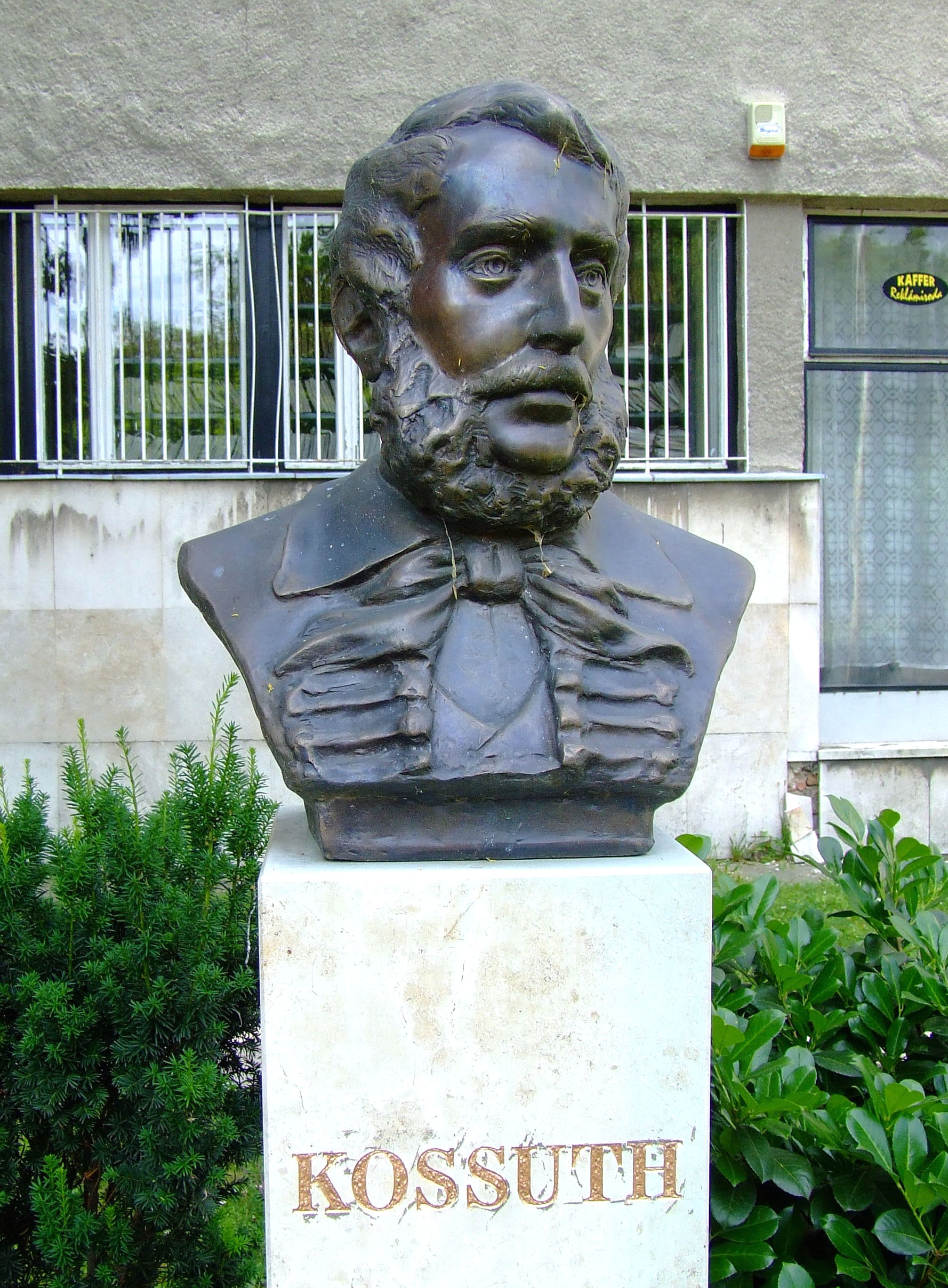 Kossuth Lajos mellszobra Kiskőrösön, a Petőfi Sándor téren (Megj. a szobor 2016-ban a tér másik részére a 10. szám közelébe került). Pálfy Gusztáv alkotása (2005)